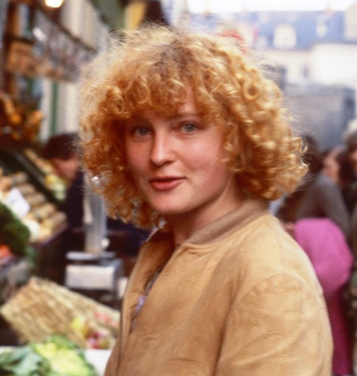 L'actrice française Valérie Mairesse photographiée dans une rue de Paris